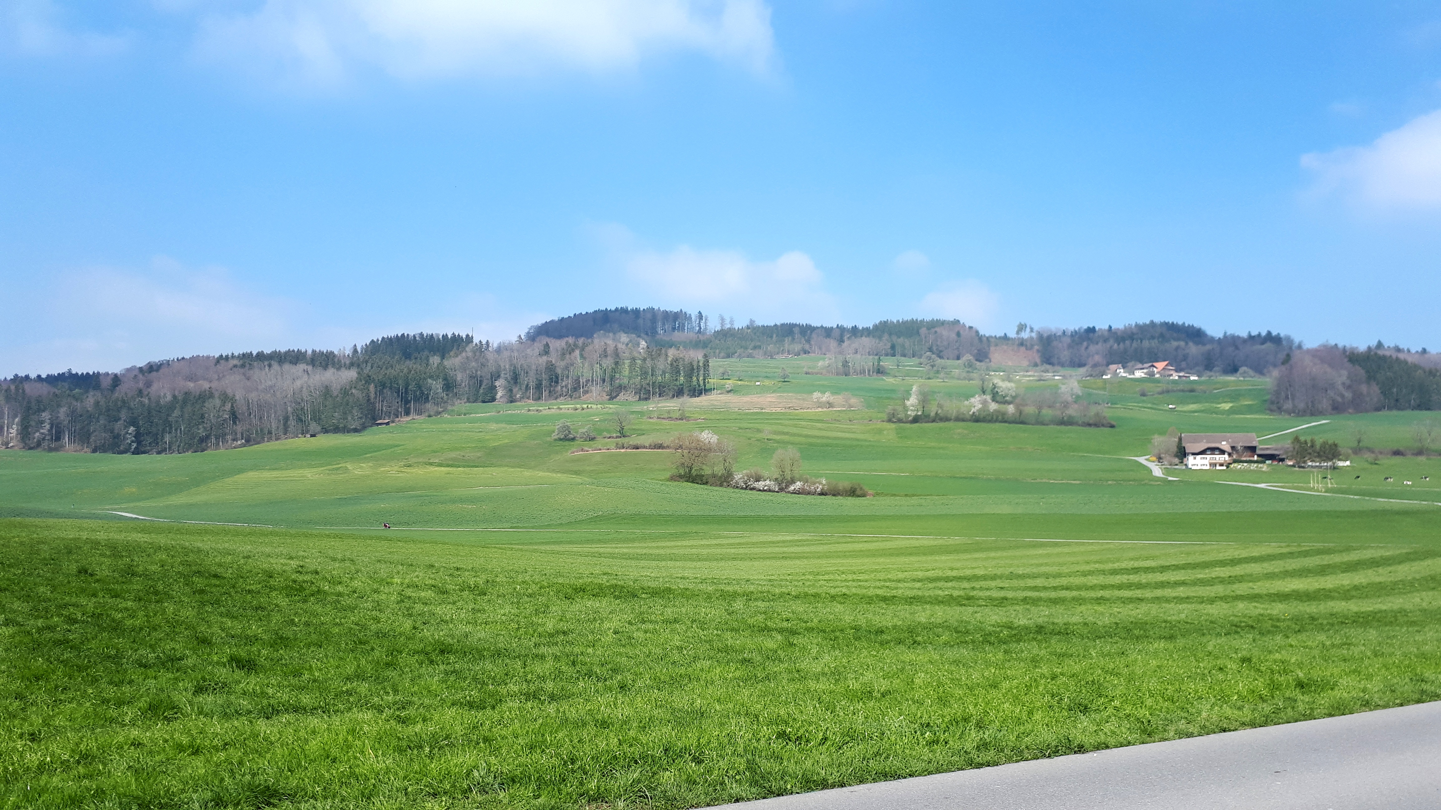 Stierenberg